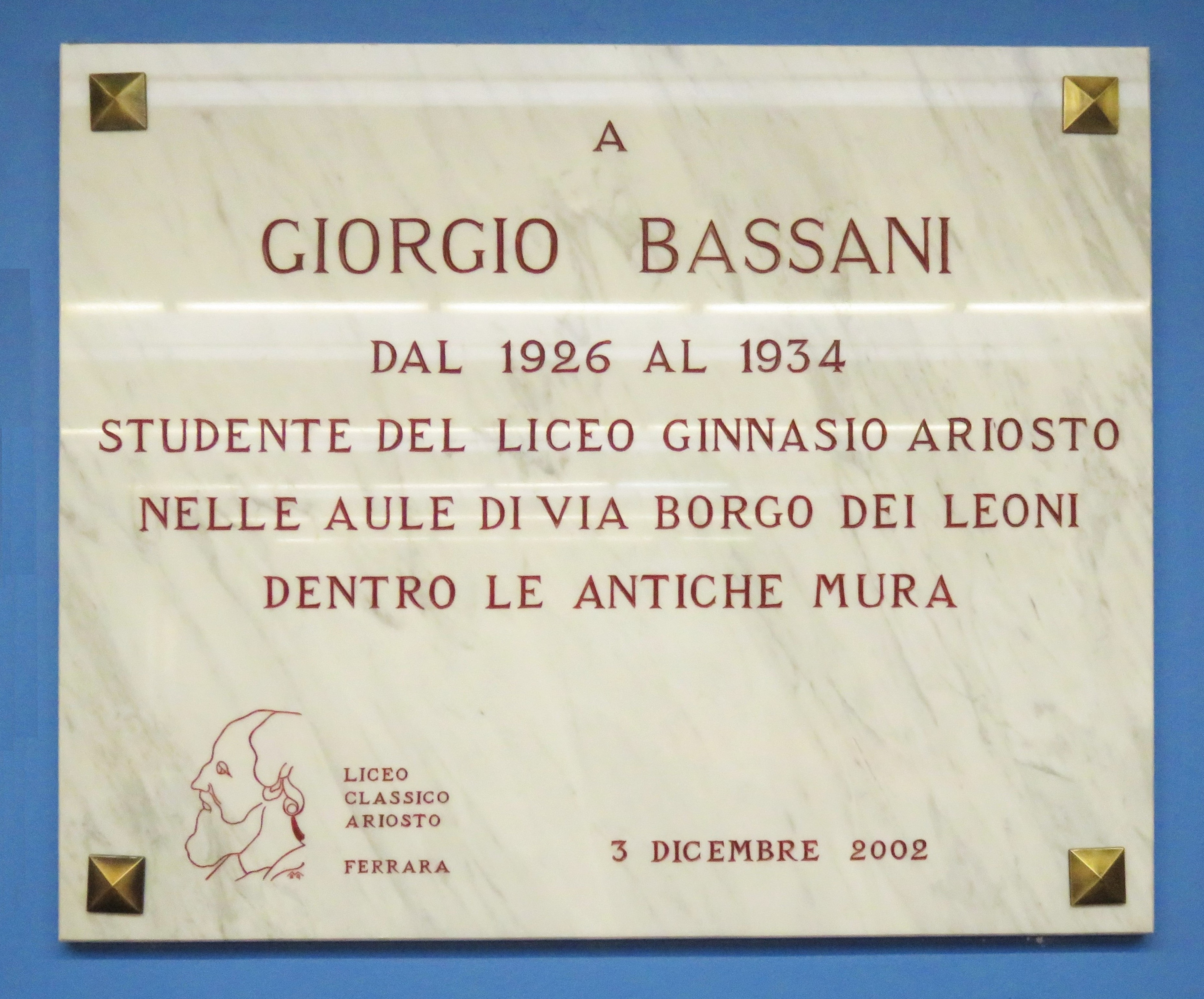 Liceo Ariosto. Epigrafe che dedica la sala dell'atrio a Giorgio Bassani